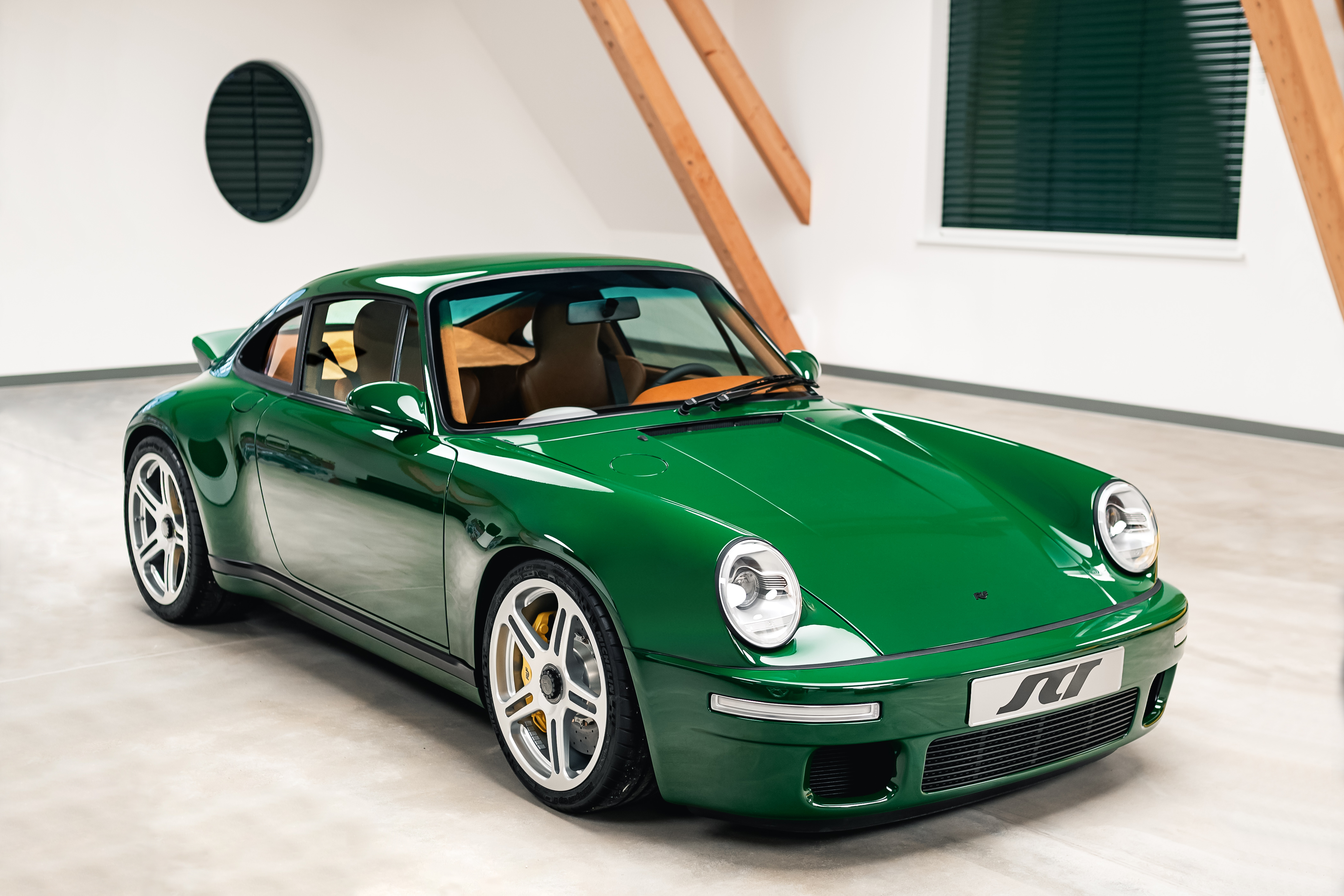 2020 RUF SCR